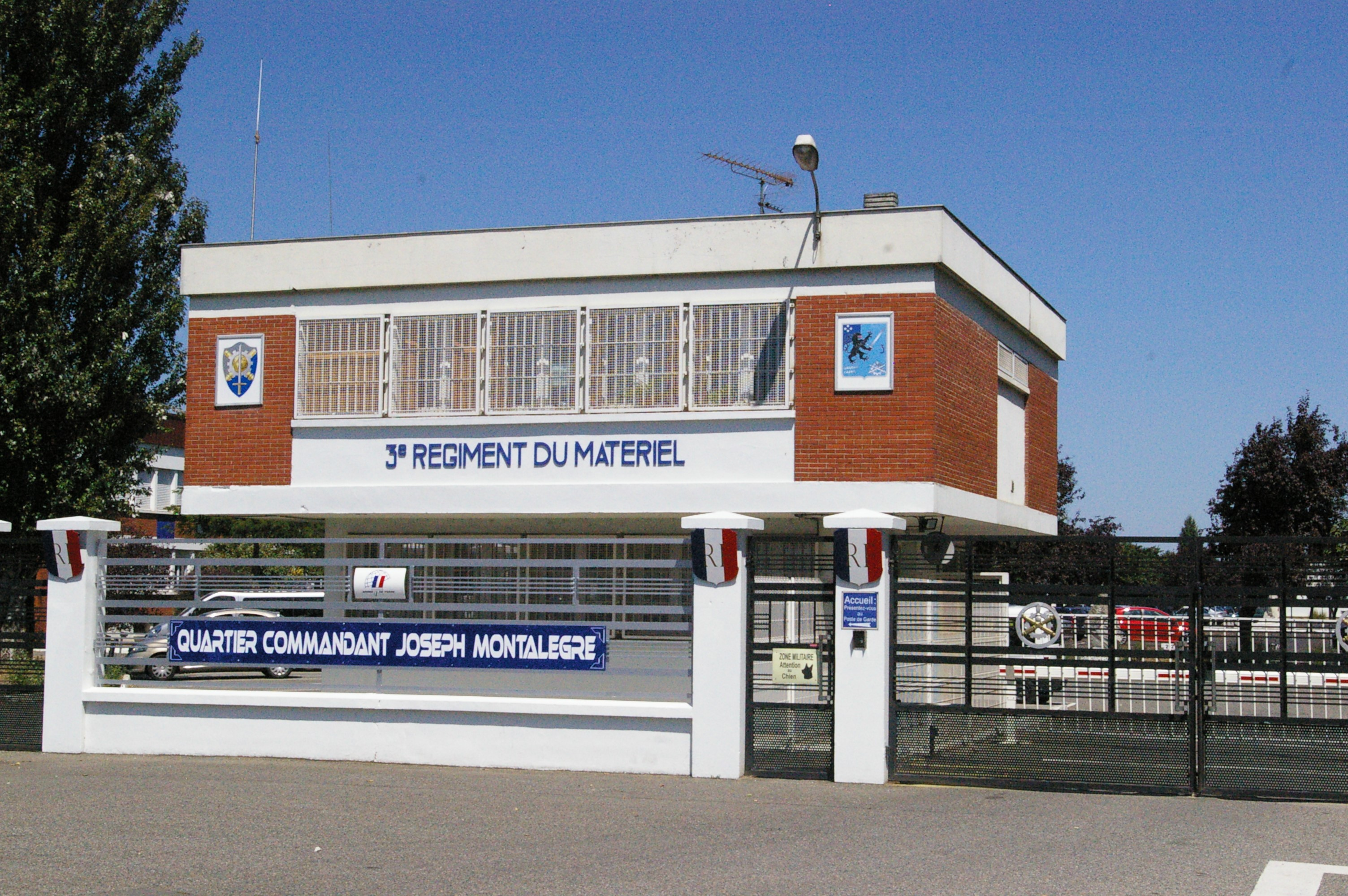 Le 3e régiment du matériel baptisé depuis le 01/07/99 quartier commandant Montalègre, Muret, département de Haute-Garonne, France